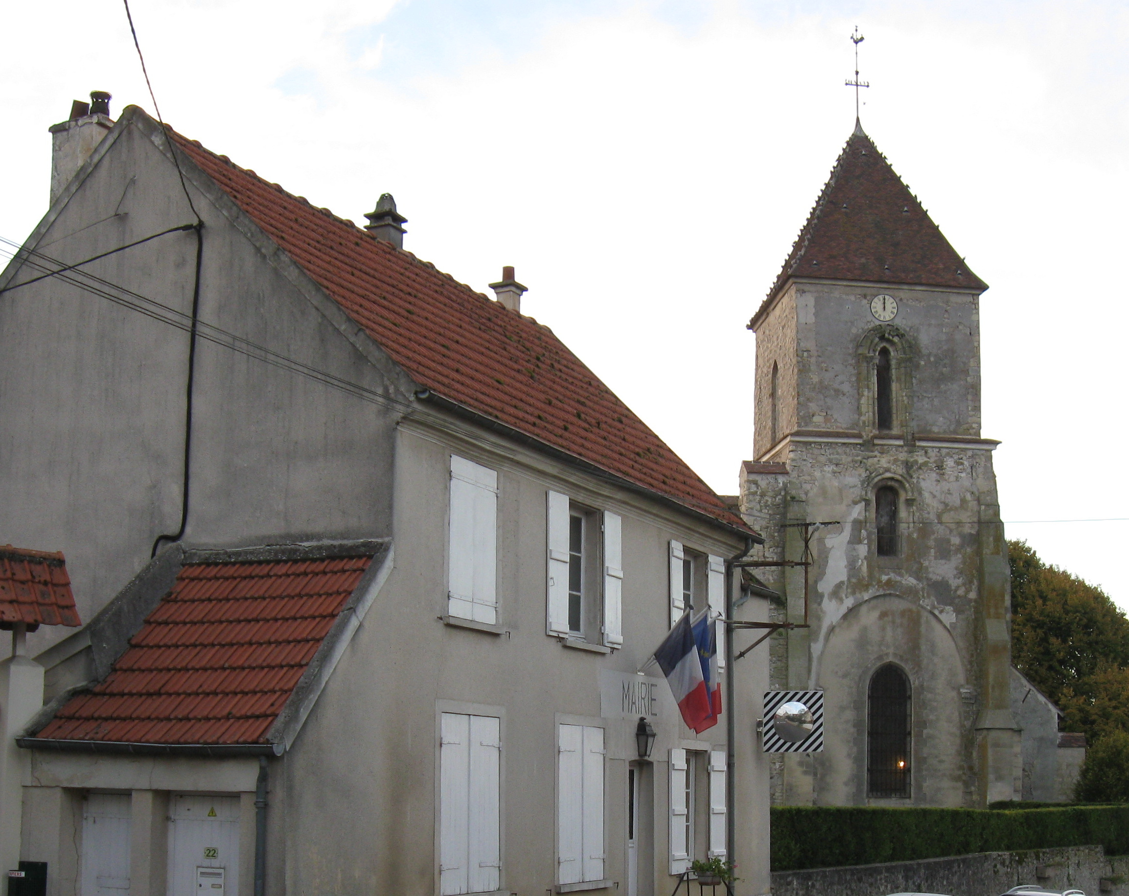 Mairie et église de Saint-Mesmes (département de la Seine-et-Marne, région Île-de-France).